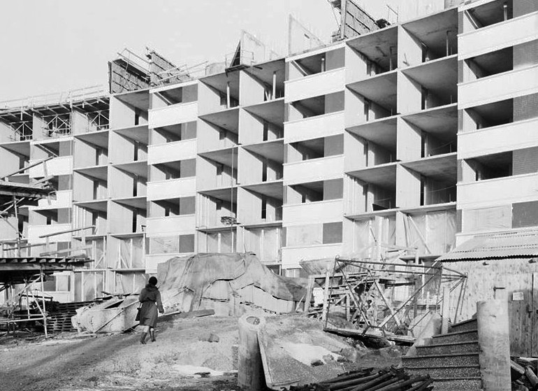 Nybygge vid Sockerbruksgränd, kv. Kulltorp